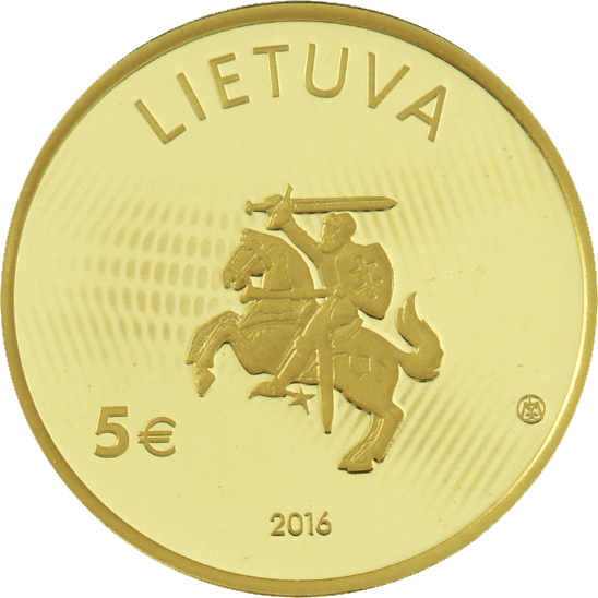 5 euro coin